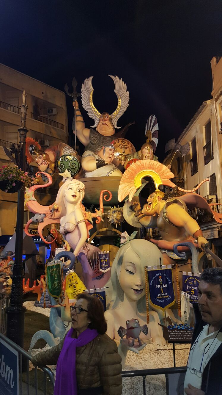 Fallas This is a photography of a Folklore festival in Spain (Wikidata id Q23653026).